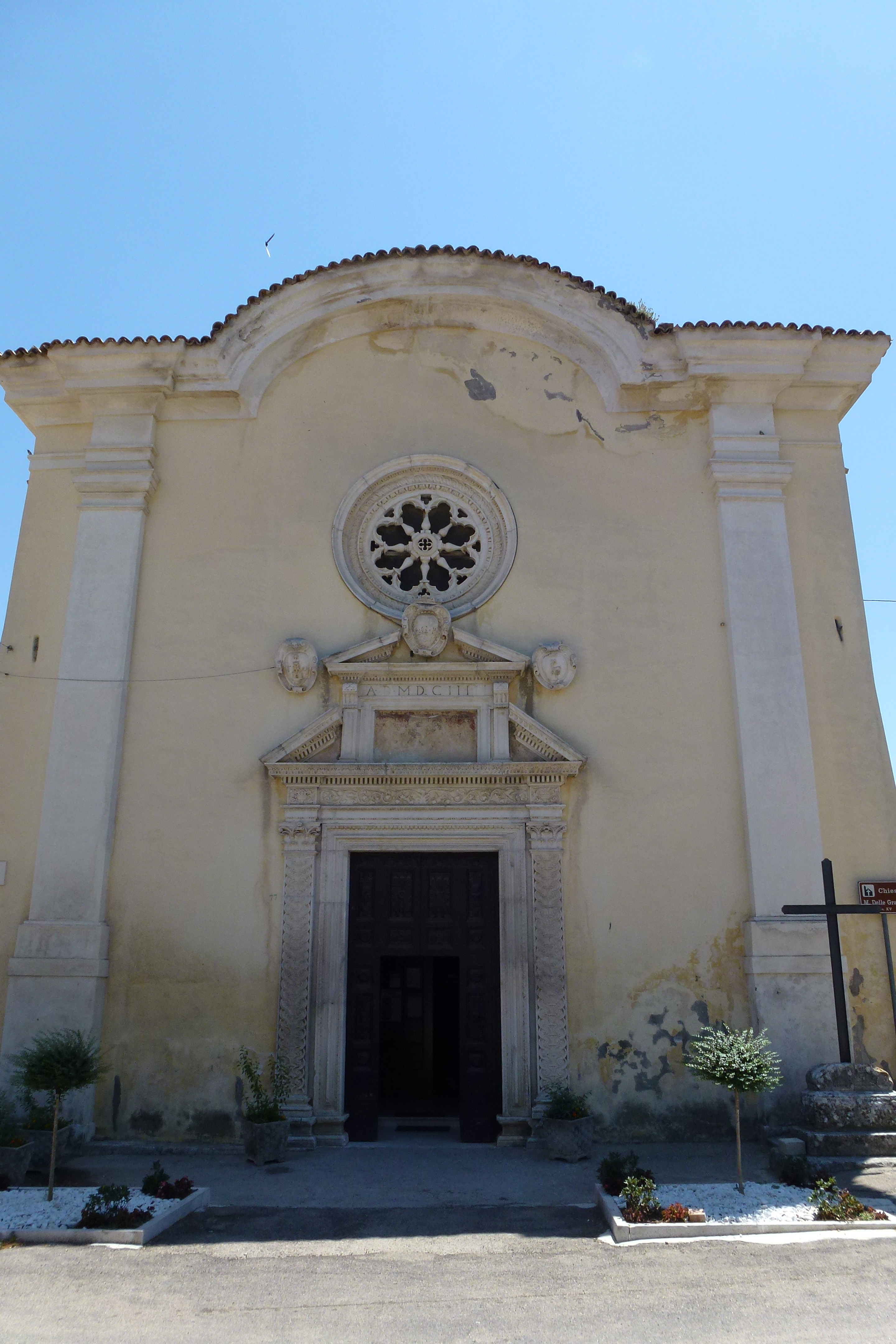 Chiesa dell Grazie